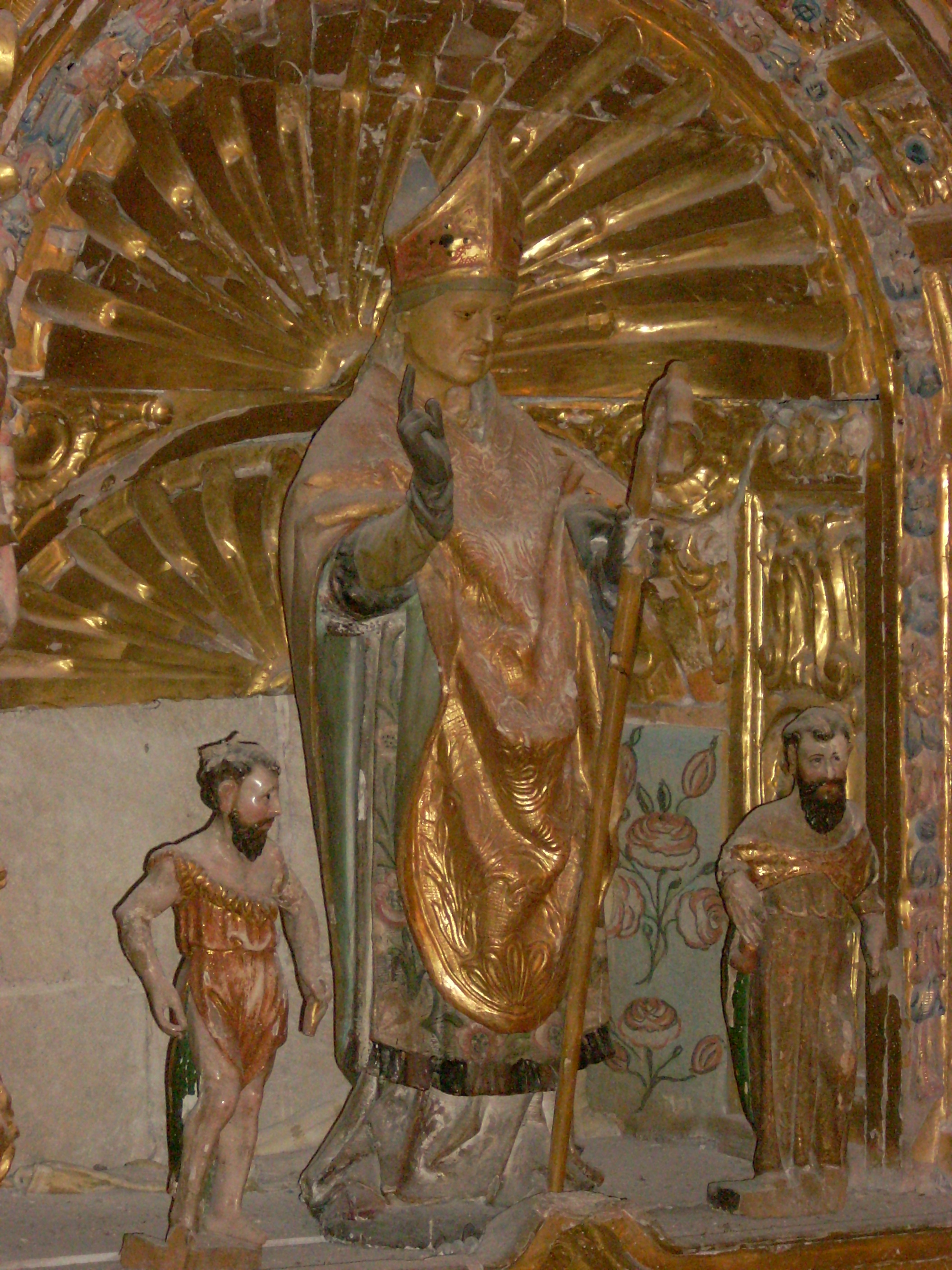 Esculturas de san Fructuoso, san Eulogio y san Augurio en la iglesia de su nombre en Colmenares, Palencia, España.